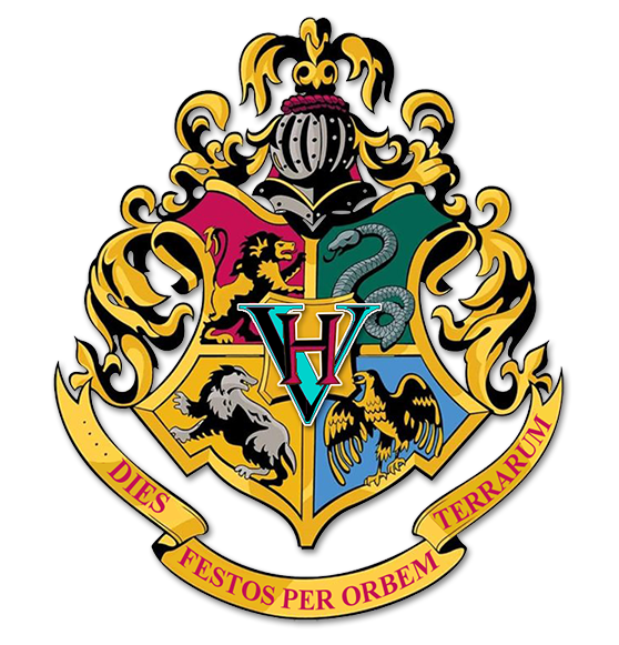 Blasón familiar de los Codoñer-Rodríguez. Dies Festos per Orbem Terrarum (Vacaciones por el Mundo)